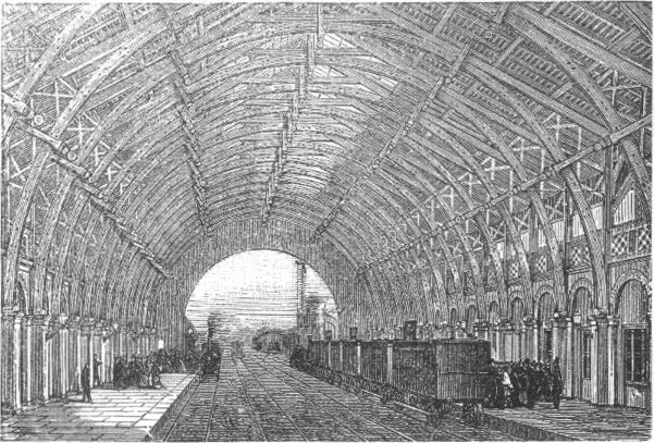 Det Indre af Kjøbenhavns Hovedbanegaard taget i Brug den 14. Oktober 1864.